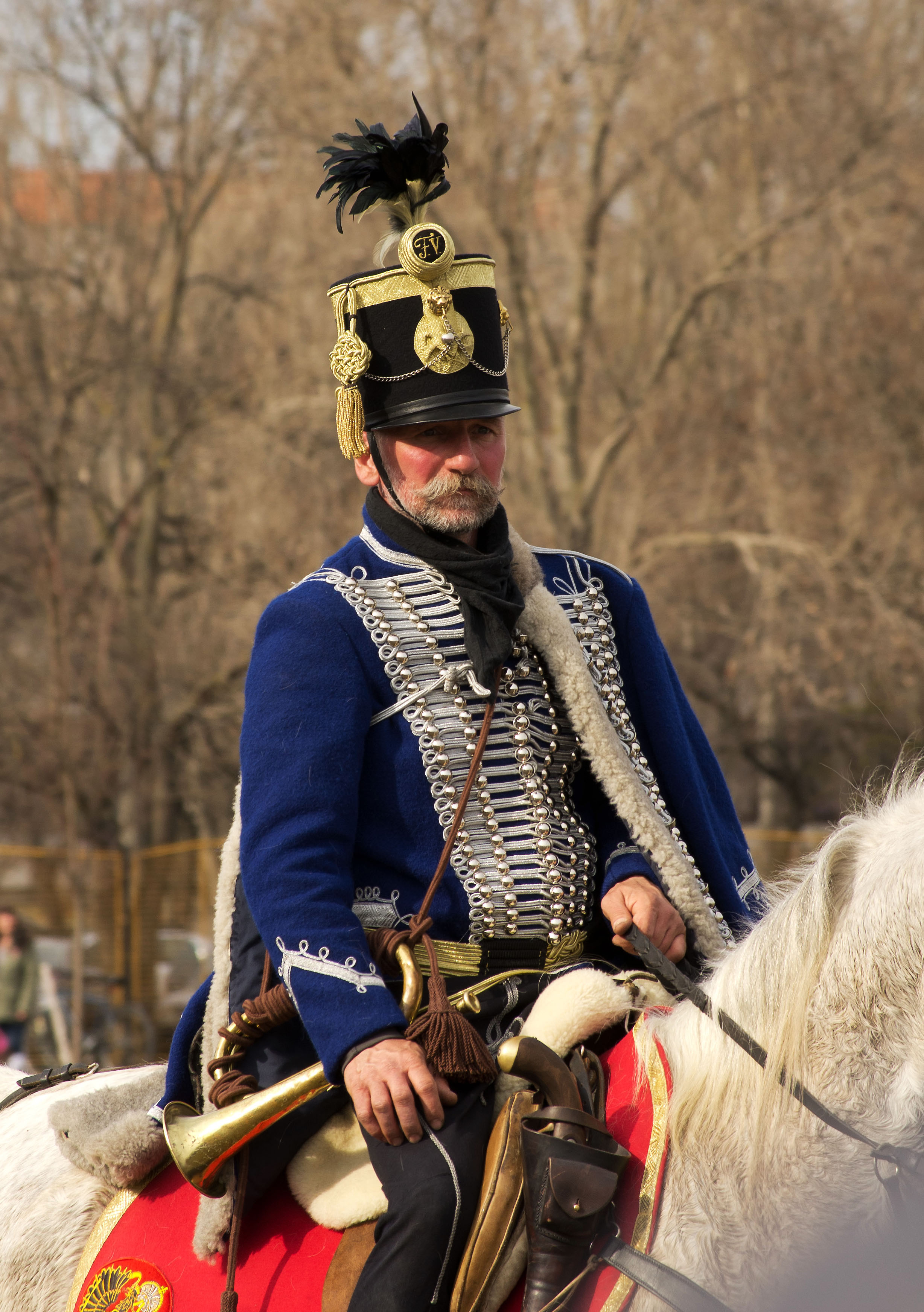 Pont ilyennek képzeltem egy veterán huszárt gyerekkoromban.